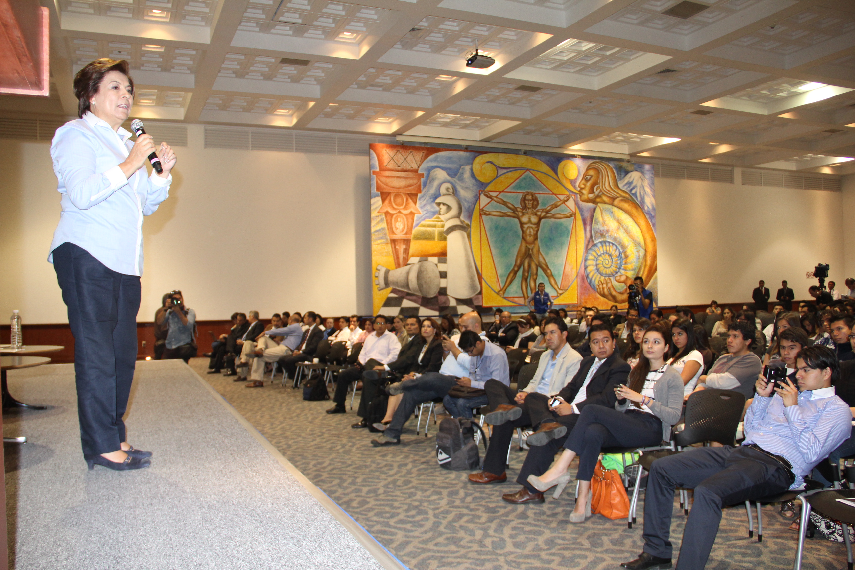 Miranda Wallace en ITESM Campus Ciudad de México durante la campaña federal de 2012